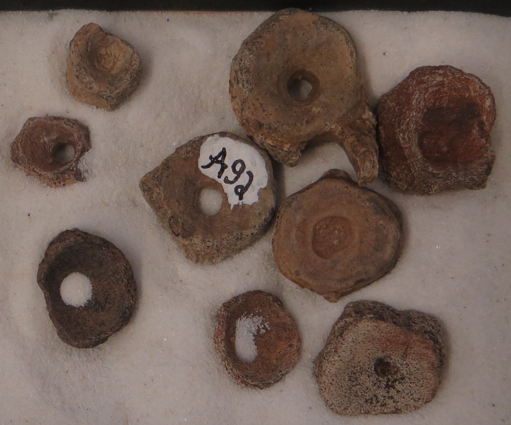 Fossil of Archeria- Took the picture at Natural History Museum, Bonn University